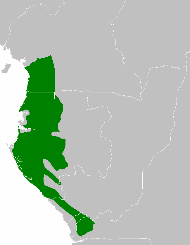 Atlantic Equatorial coastal forests ecoregion map